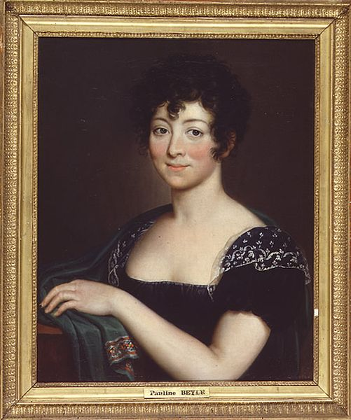 Pauline Beyle (1786-1857), sorella di Stendhal. Épouse de François Daniel Périer Lagrange